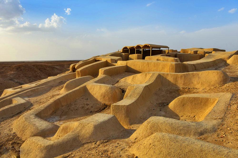 شهر سوخته نام بقایای دولت شهری باستانی در ایران است که در ۵۶ کیلومتری زابل و در حاشیه جاده زابل-زاهدان در شرق ایران در استان سیستان و بلوچستان واقع شده‌است.